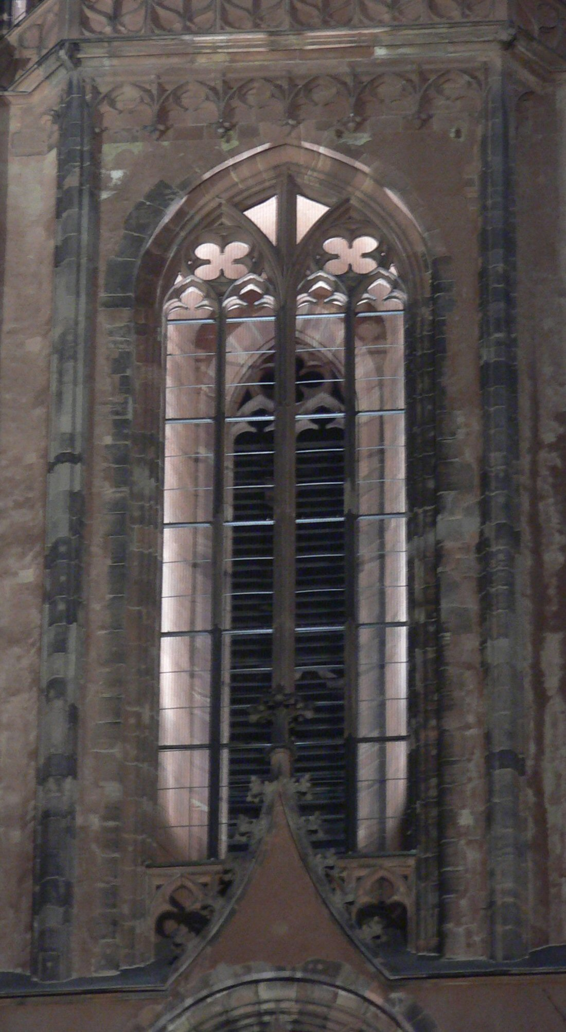 Der untere Glockenboden des Domturmes während des Stadtgeläuts